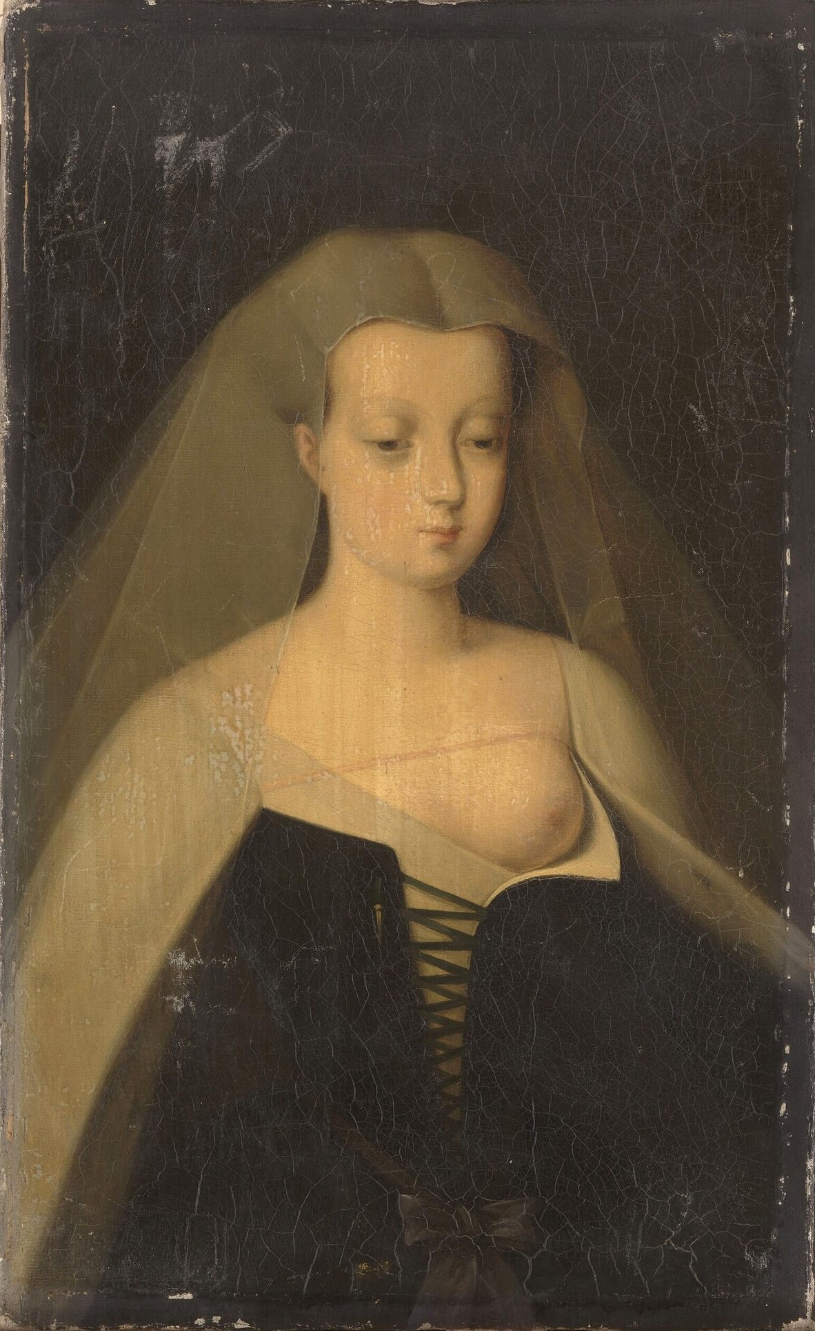 copie d'après un original de Fouquet conservé au Musée royal des beaux-arts d'Anvers ; commandé par Louis Philippe pour le musée historique de Versailles en 1833